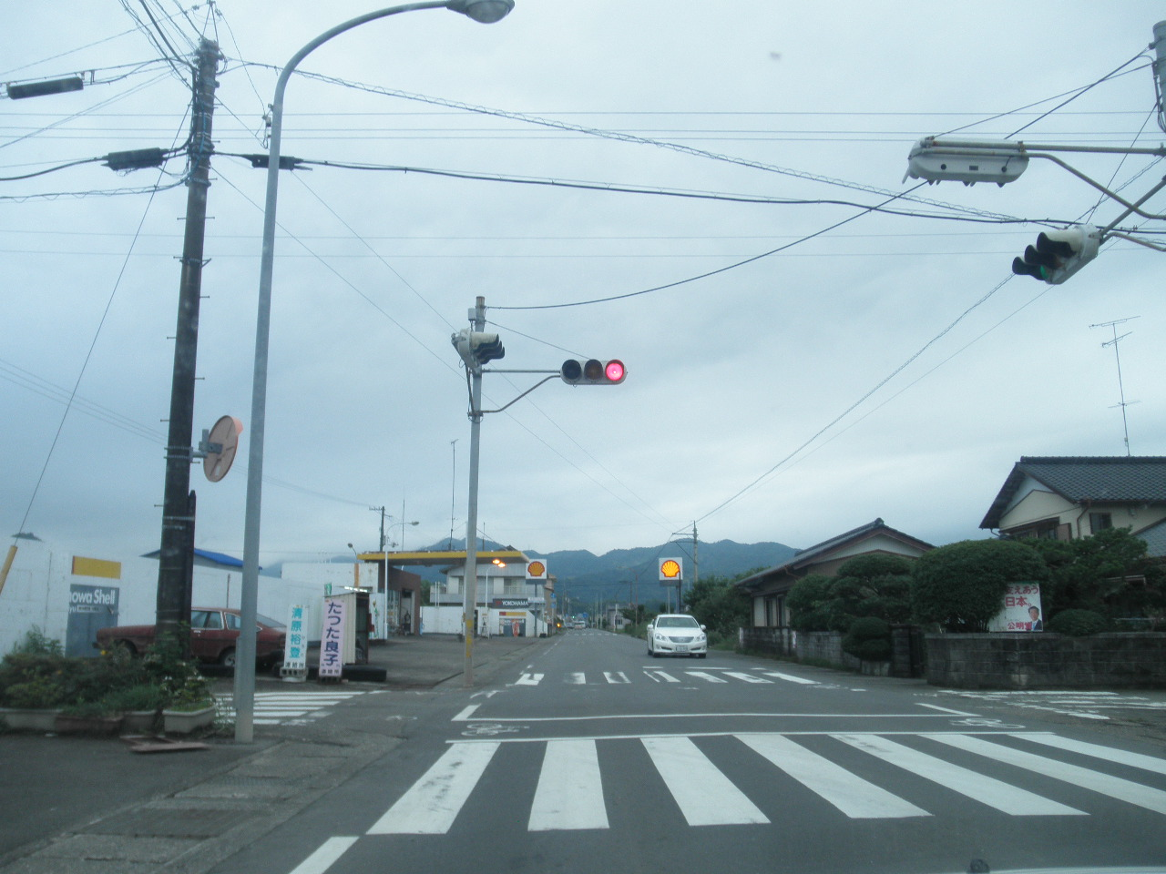 徳島県阿南市下大野町小野 徳島県道22号阿南勝浦線